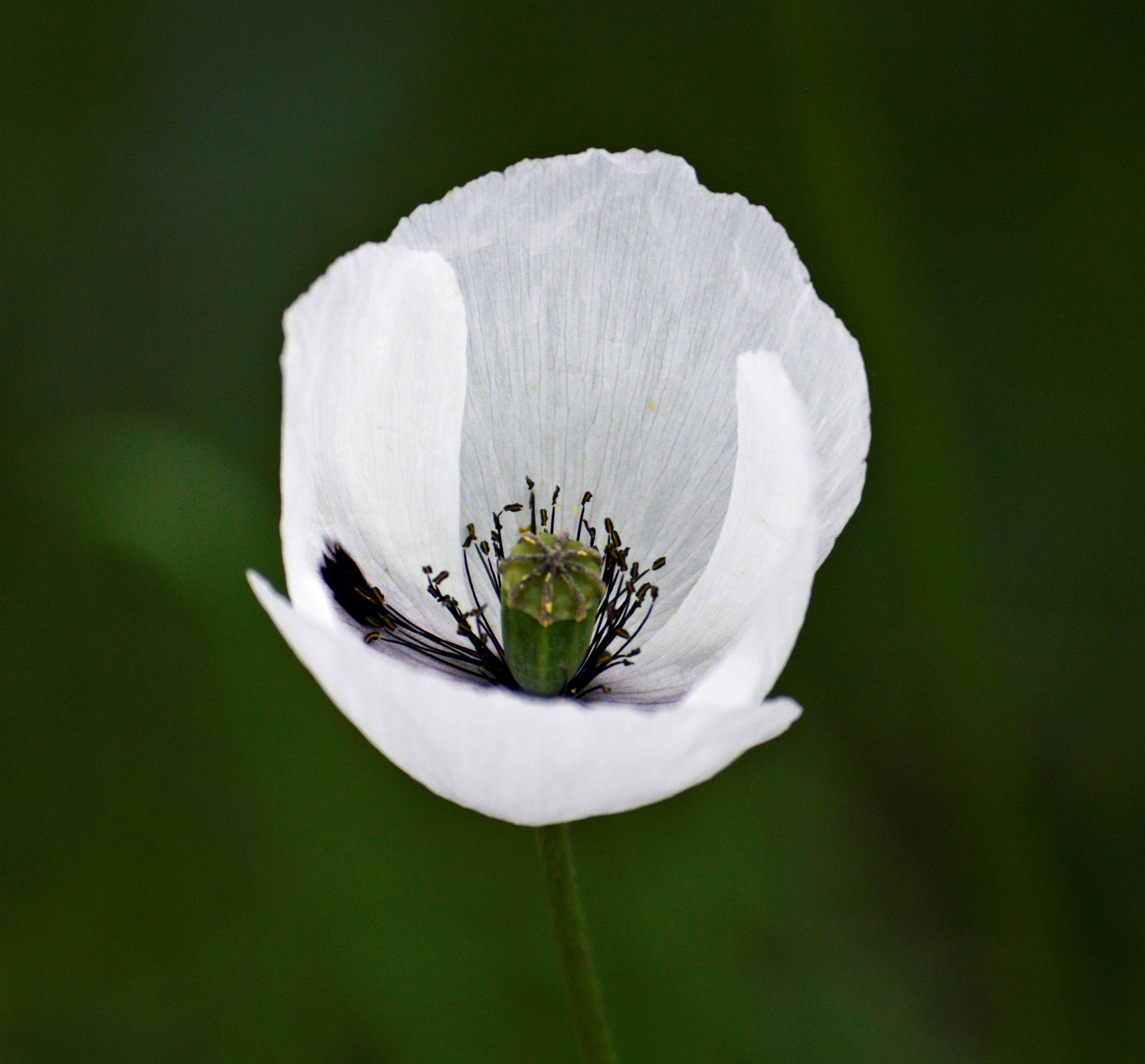 Бијели мак Латинско име: Papaver somniferum L. Породица: Papaveraceae (Mohngewächse)